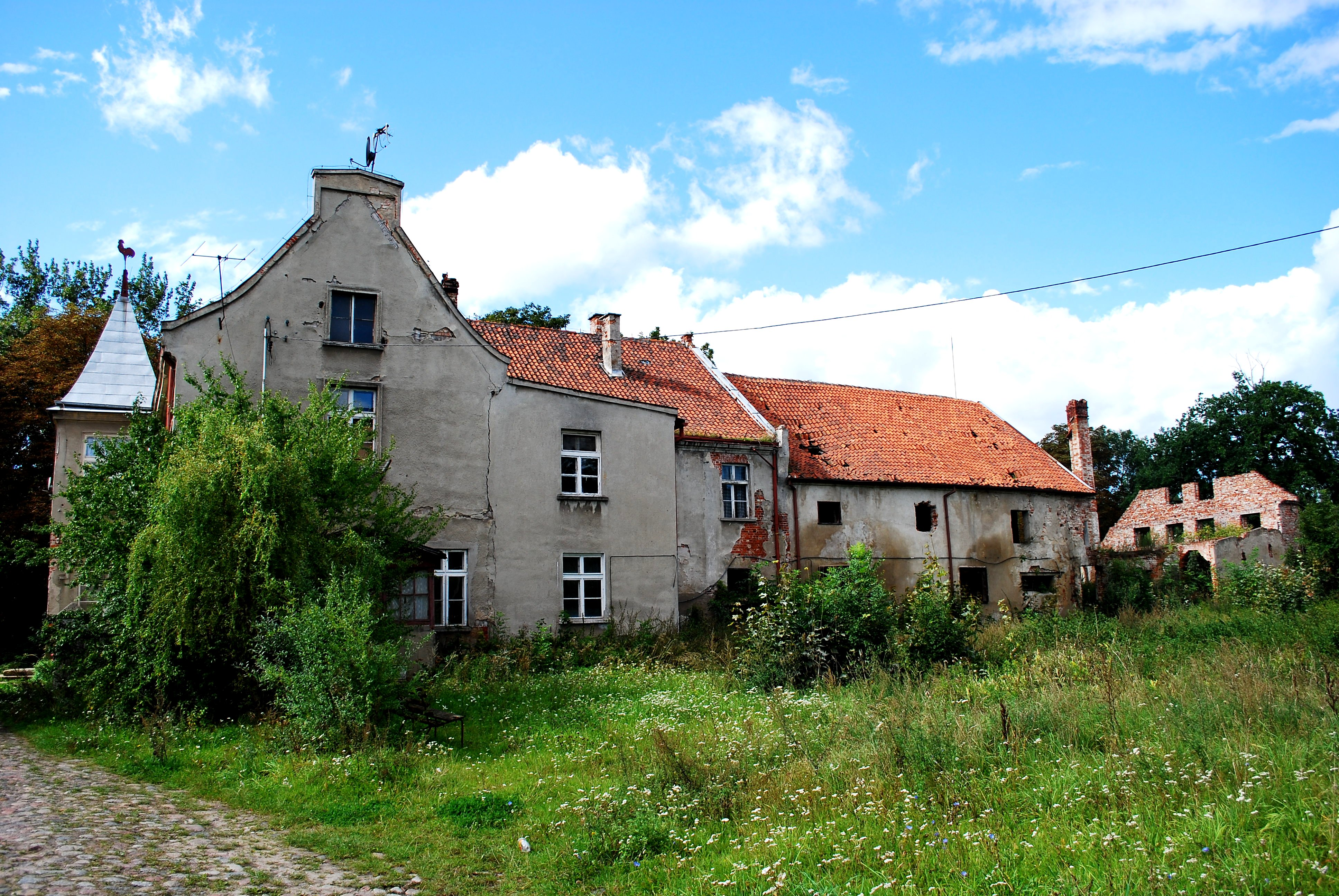 Relikty zamku pokrzyżackiego w miejscowości Grabiny Zameczek